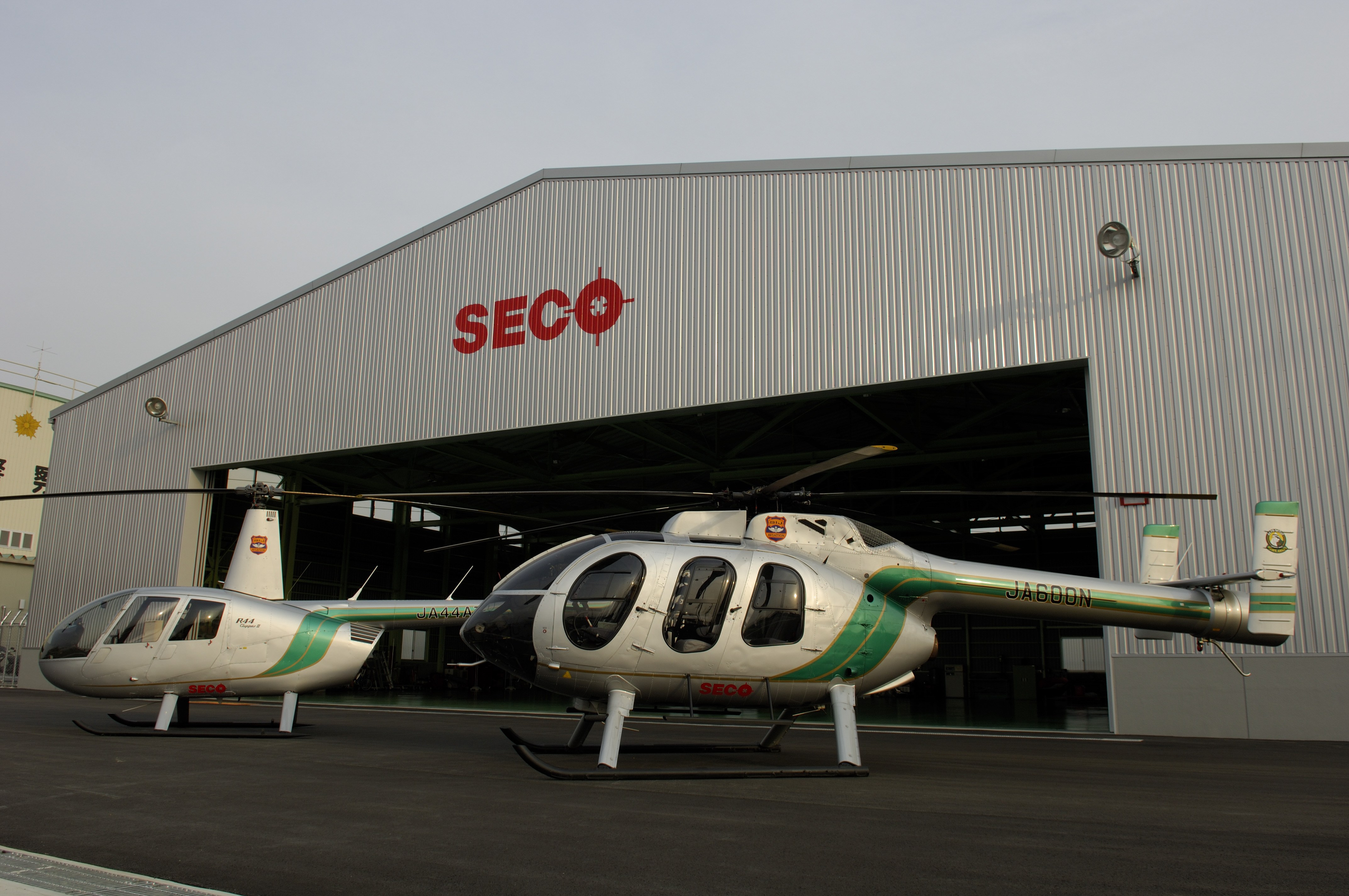 名古屋空港格納庫（事務所）と保有ヘリコプター